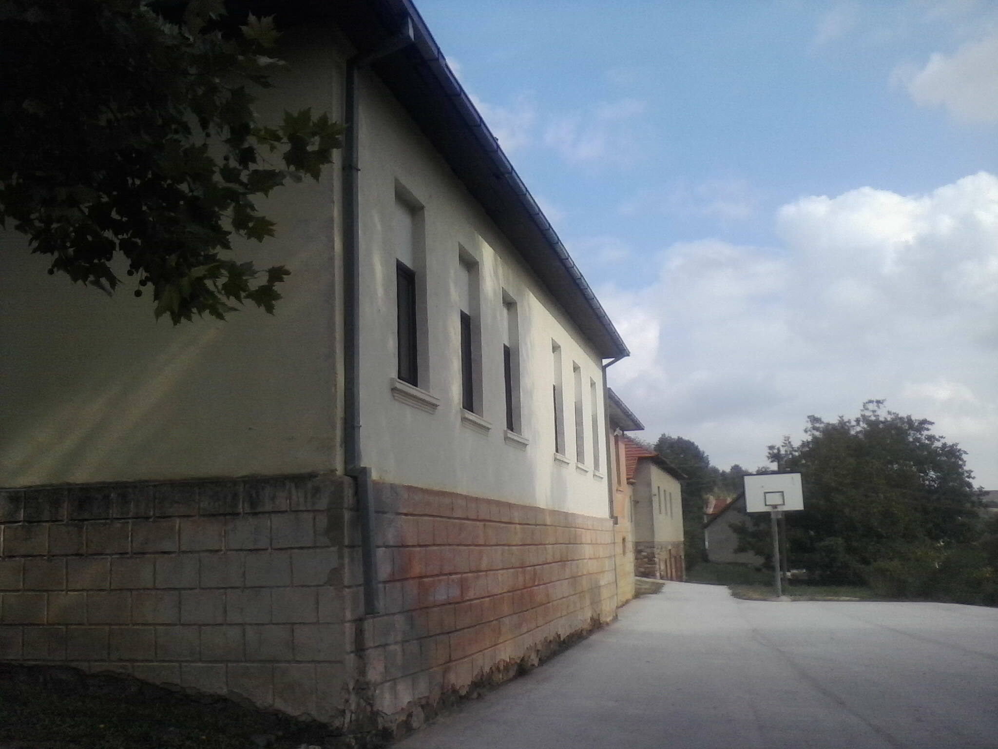 Школа у Горњем Штипљу